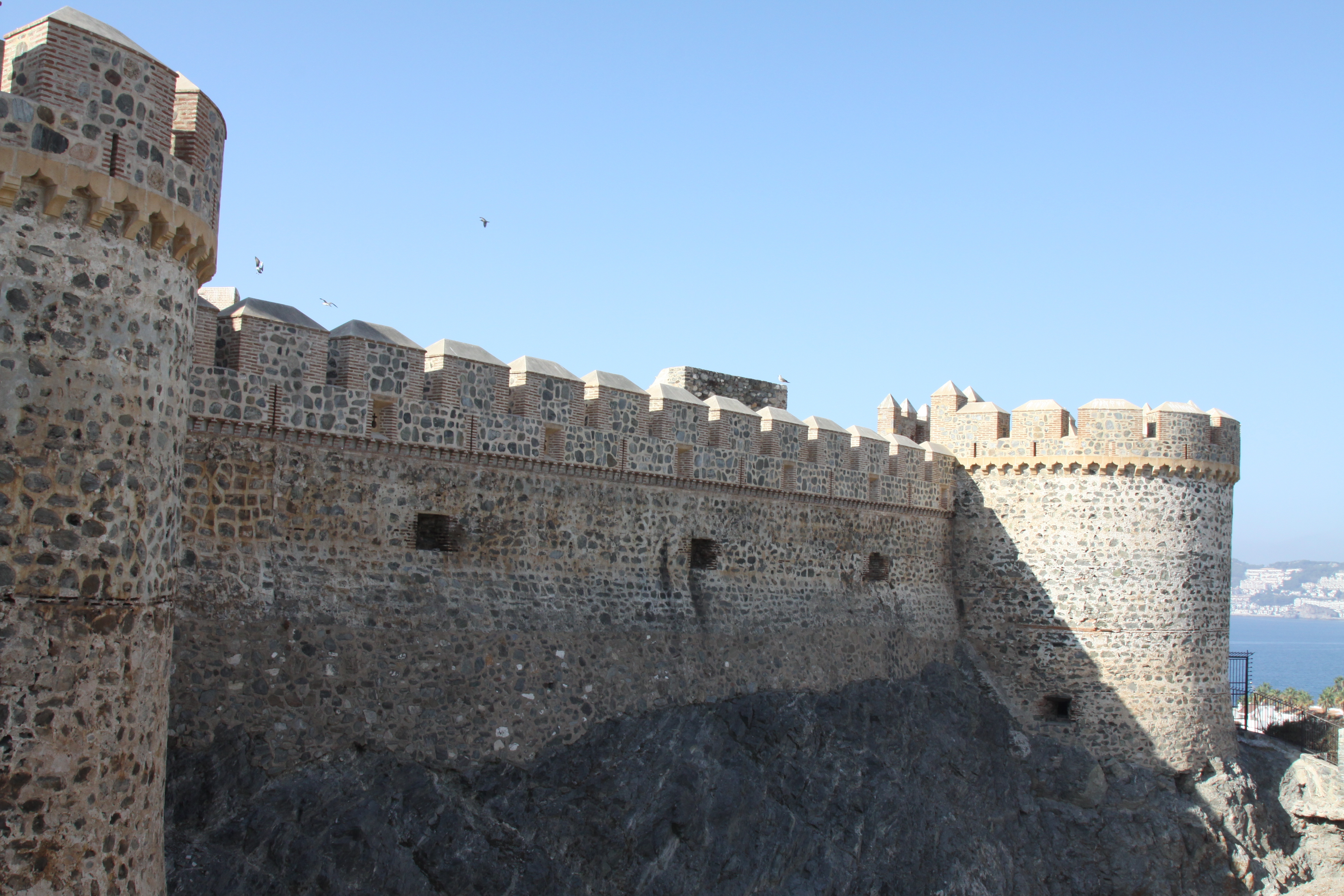 lienzo lateral derecho de la fachada principal del castillo de San Miguel en Almuñecar